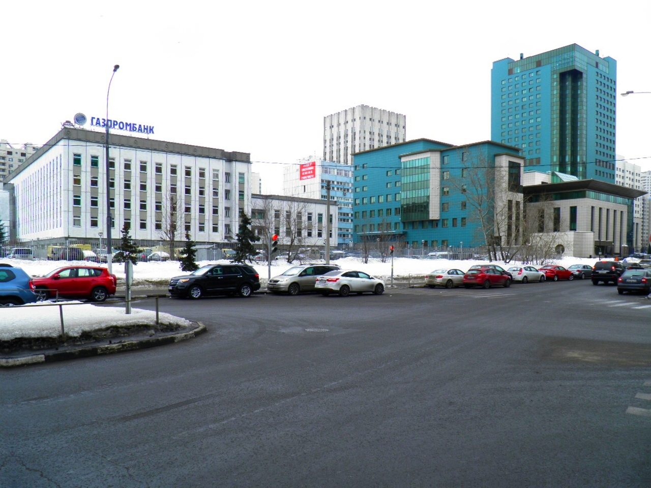 БАНК